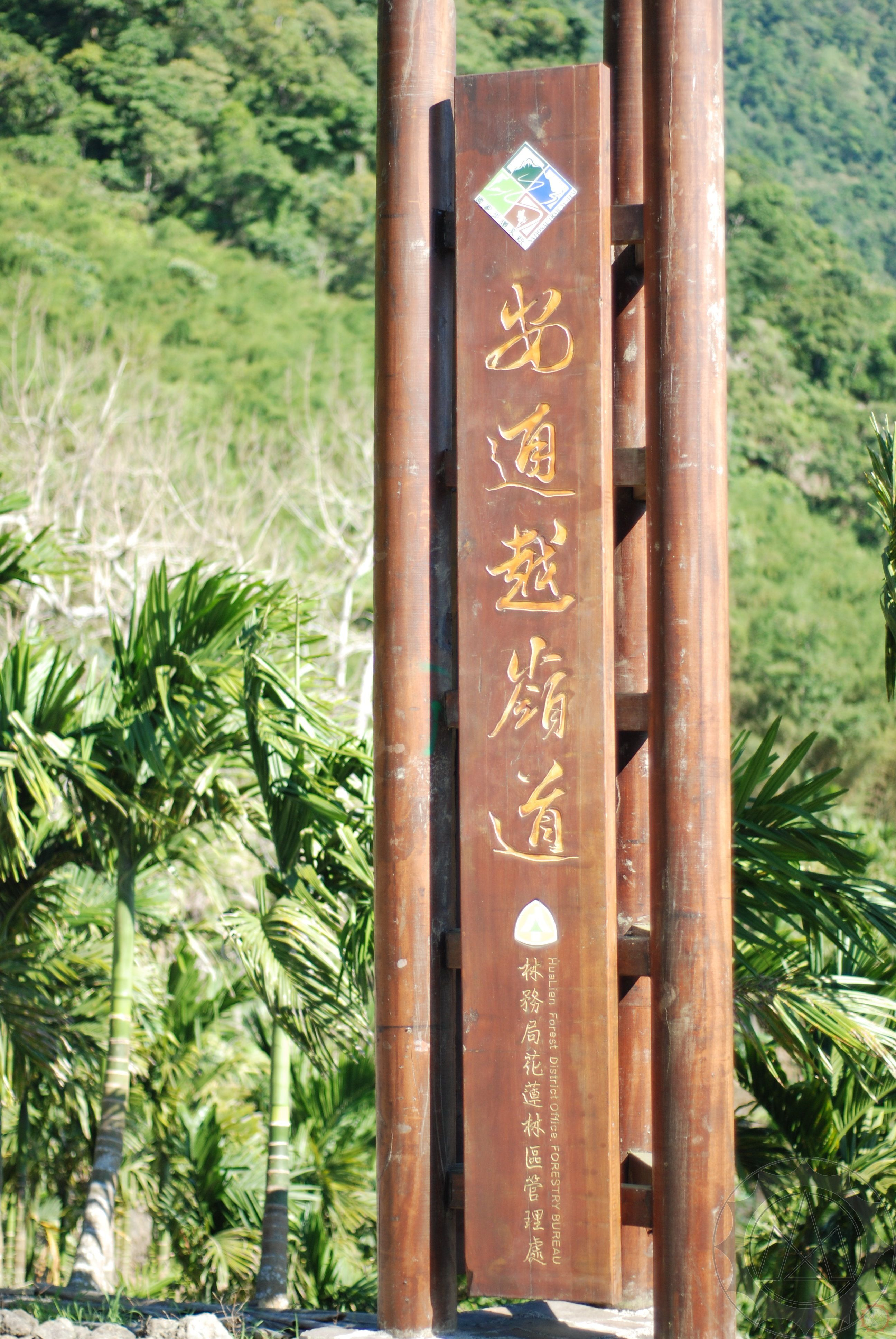 中文（台灣）: 安通越嶺古道 西段